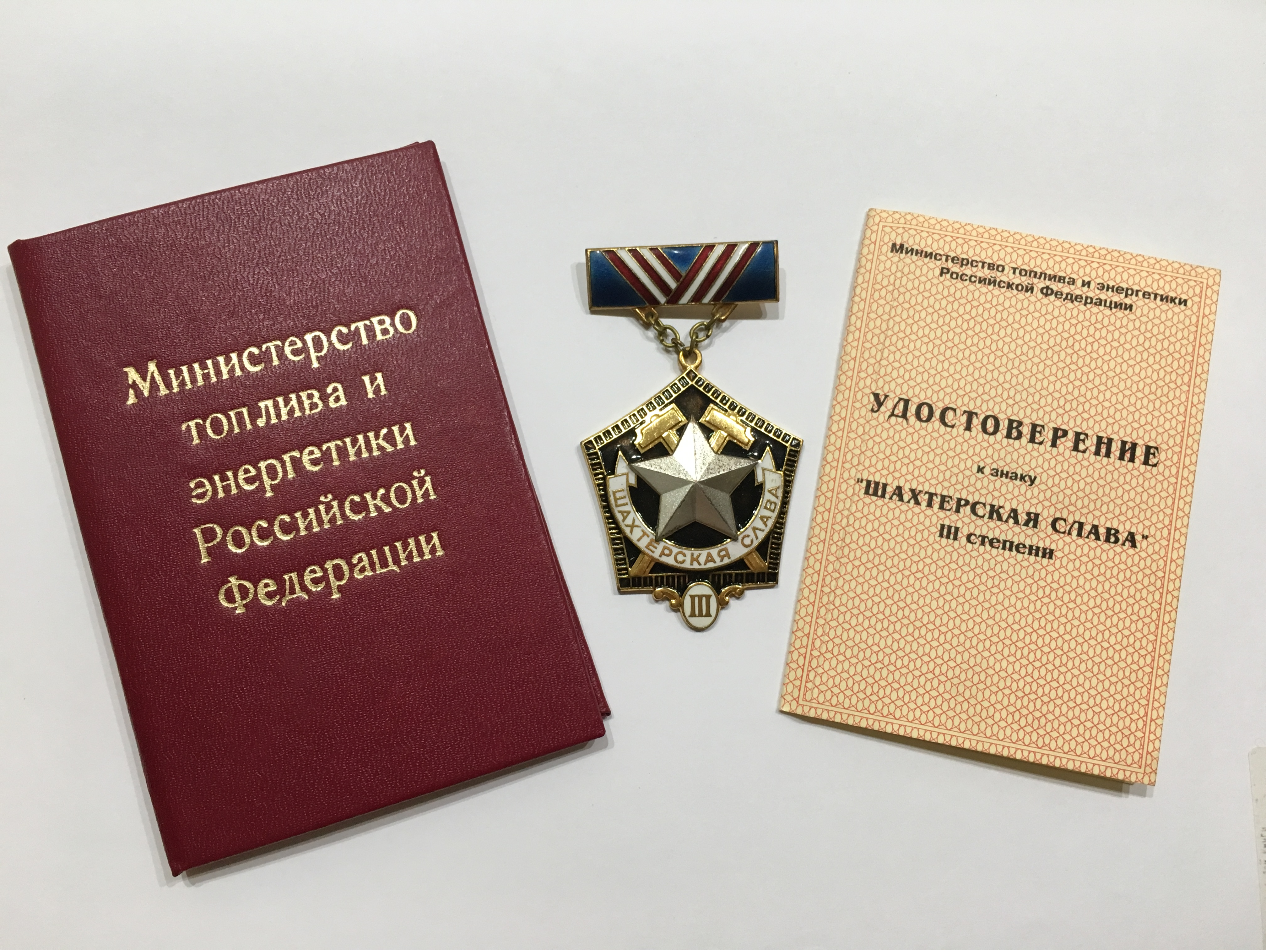 За заслуги в развитии угольной промышленности награждён знаком "ШАХТЁРСКАЯ СЛАВА" III степени.